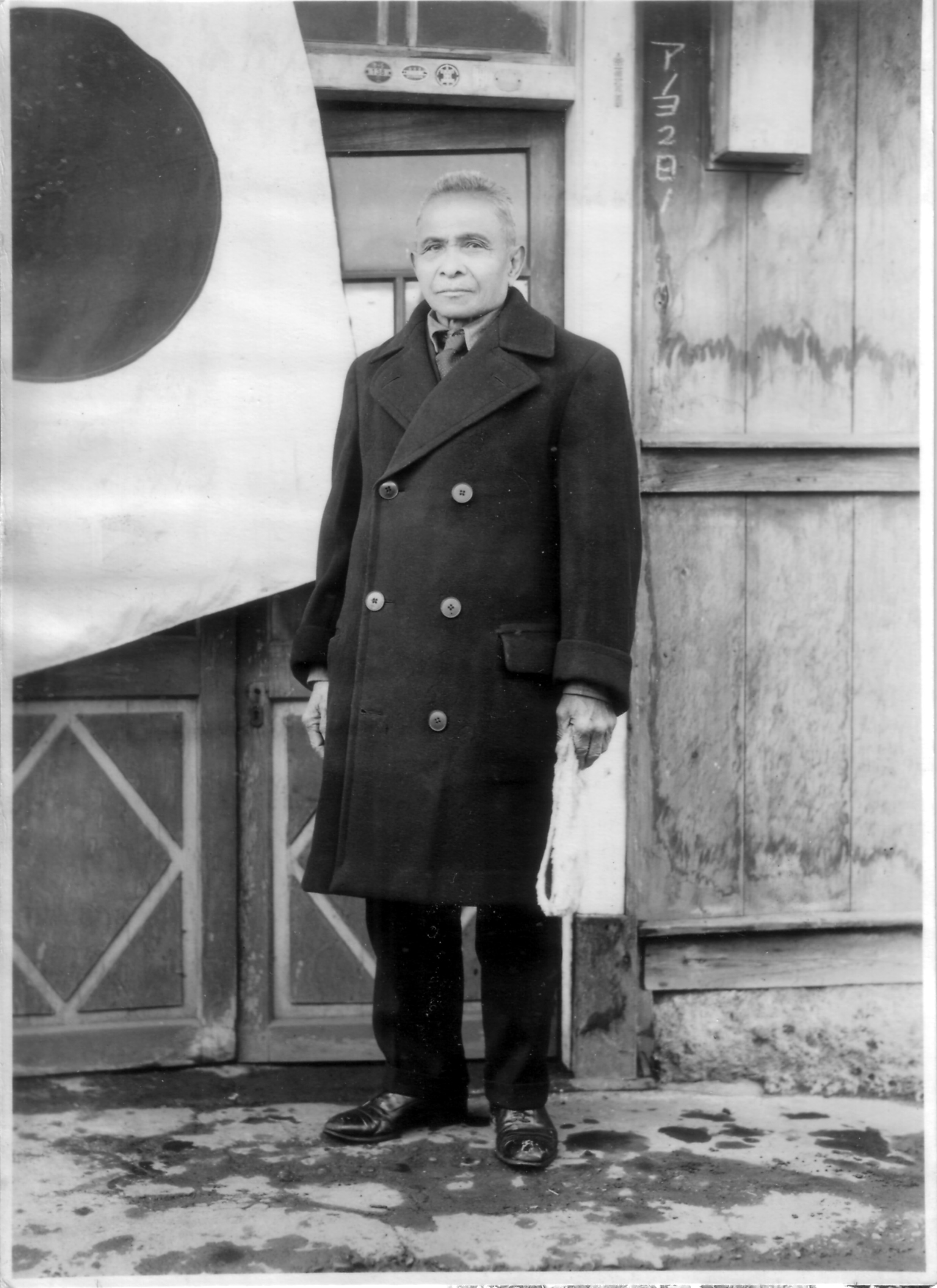 Artemio Ricarte at door front of "Syokumin Gijuku" (Setayaya,Tokyo,Japan) at Jan. of 1944